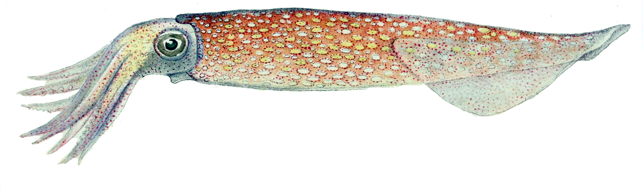 Todarodes sagittatus